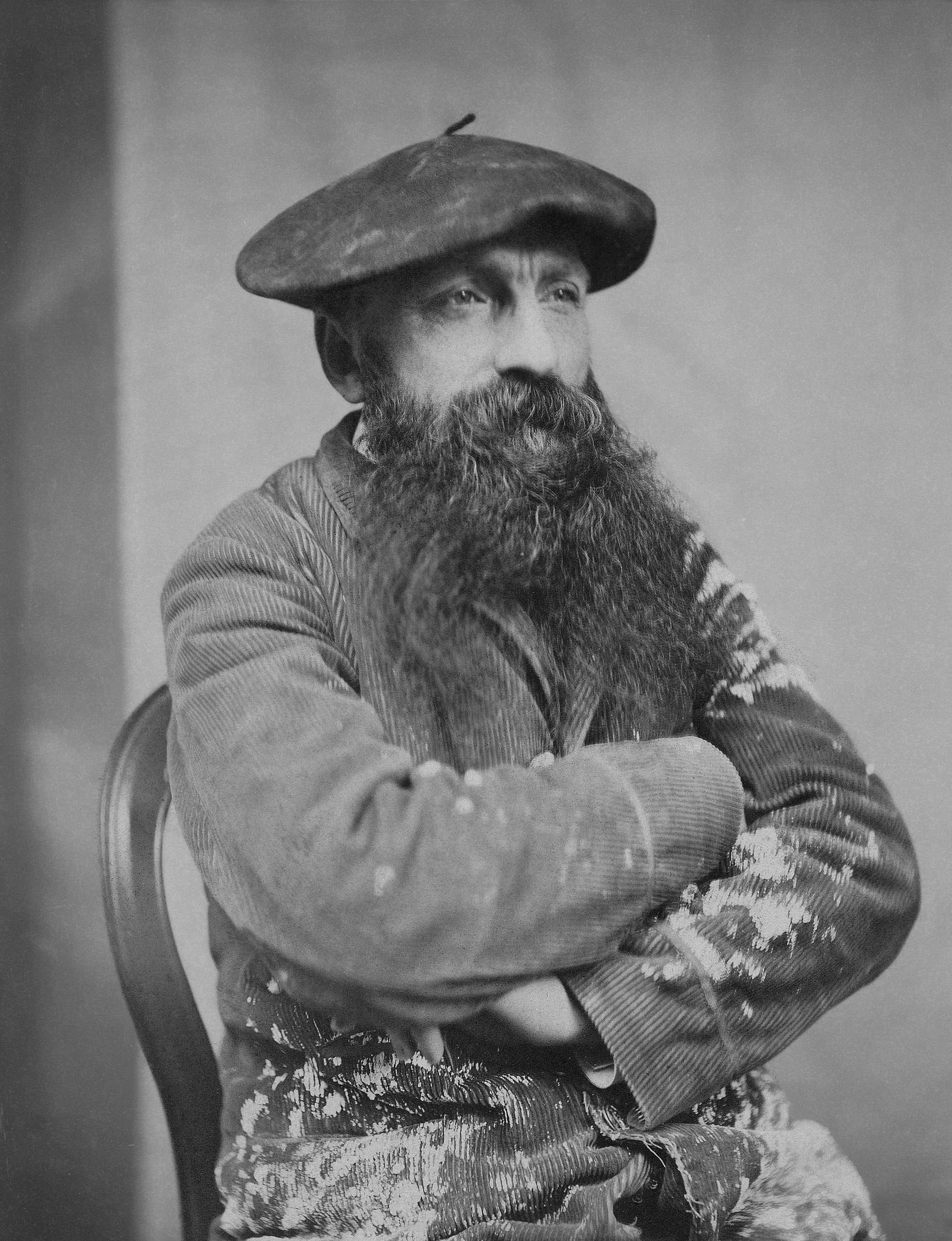 Photographie trouvée par Utilisateur:Semnoz sur le CD-Rom de NetSurf n°11 en janvier 1997 librement diffusable.